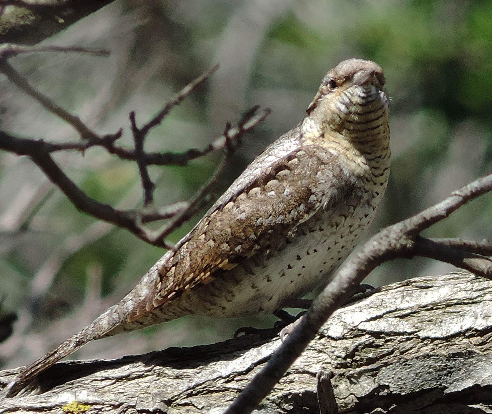 Torcol Fourmilier, espèce nicheuse sédentaire en Tunisie mais rarement observée, localisé dans les boisements frais du nord de la Tunisie, photo prise à El Haouaria